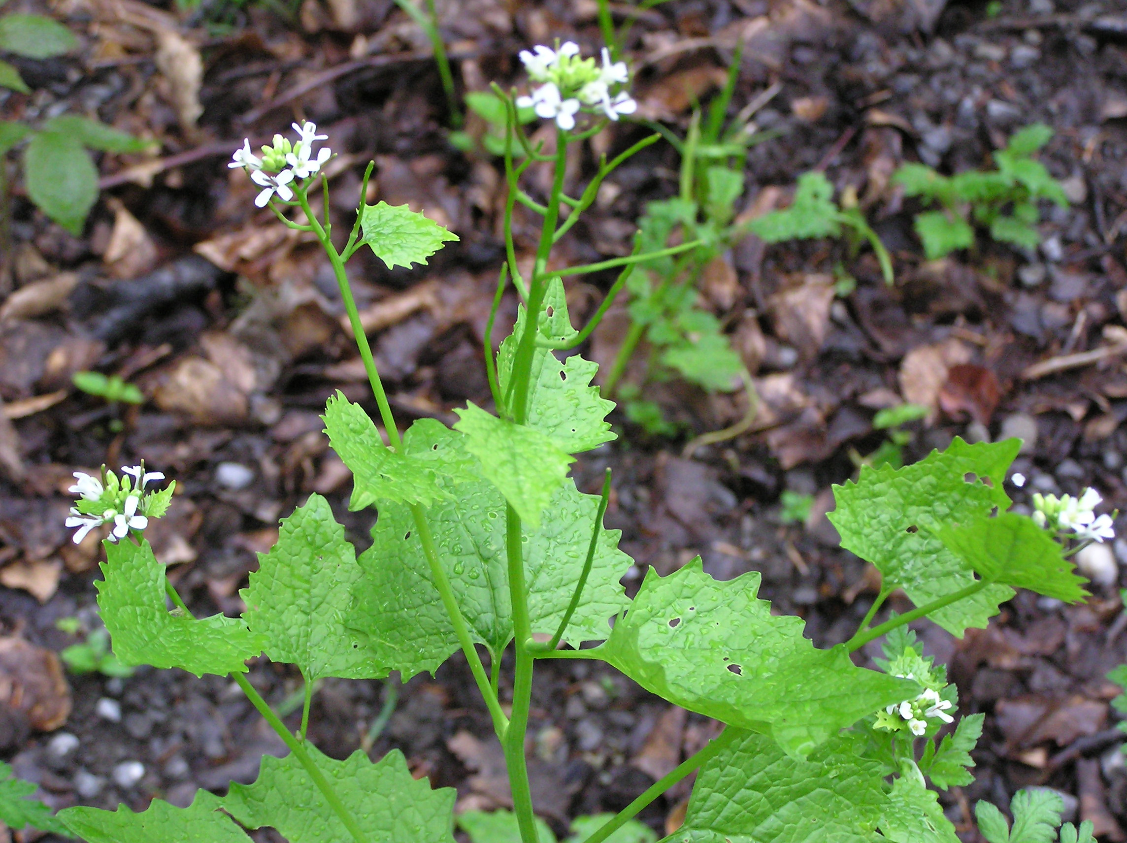 Knoblauchsrauke, auch Gemeines Lauchkraut (Alliaria petiolata), 15.05.2005, Hohberg, 76327 Pfinztal, Ortsteil Wöschbach